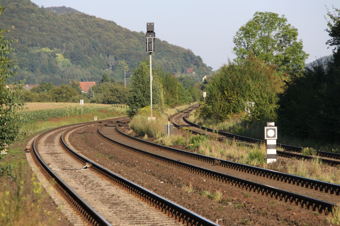 Hersbruck Ost Ost